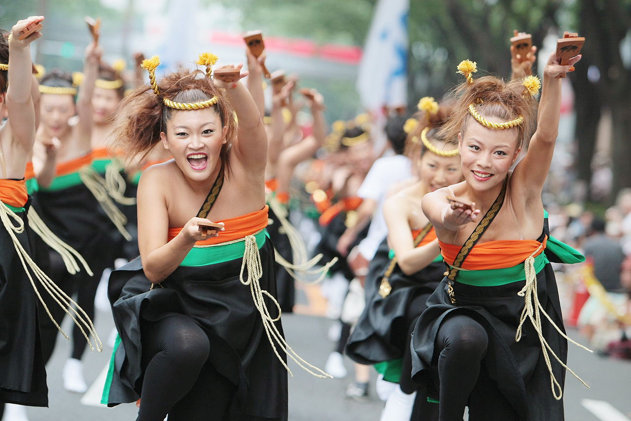 原宿スーパーよさこい2007